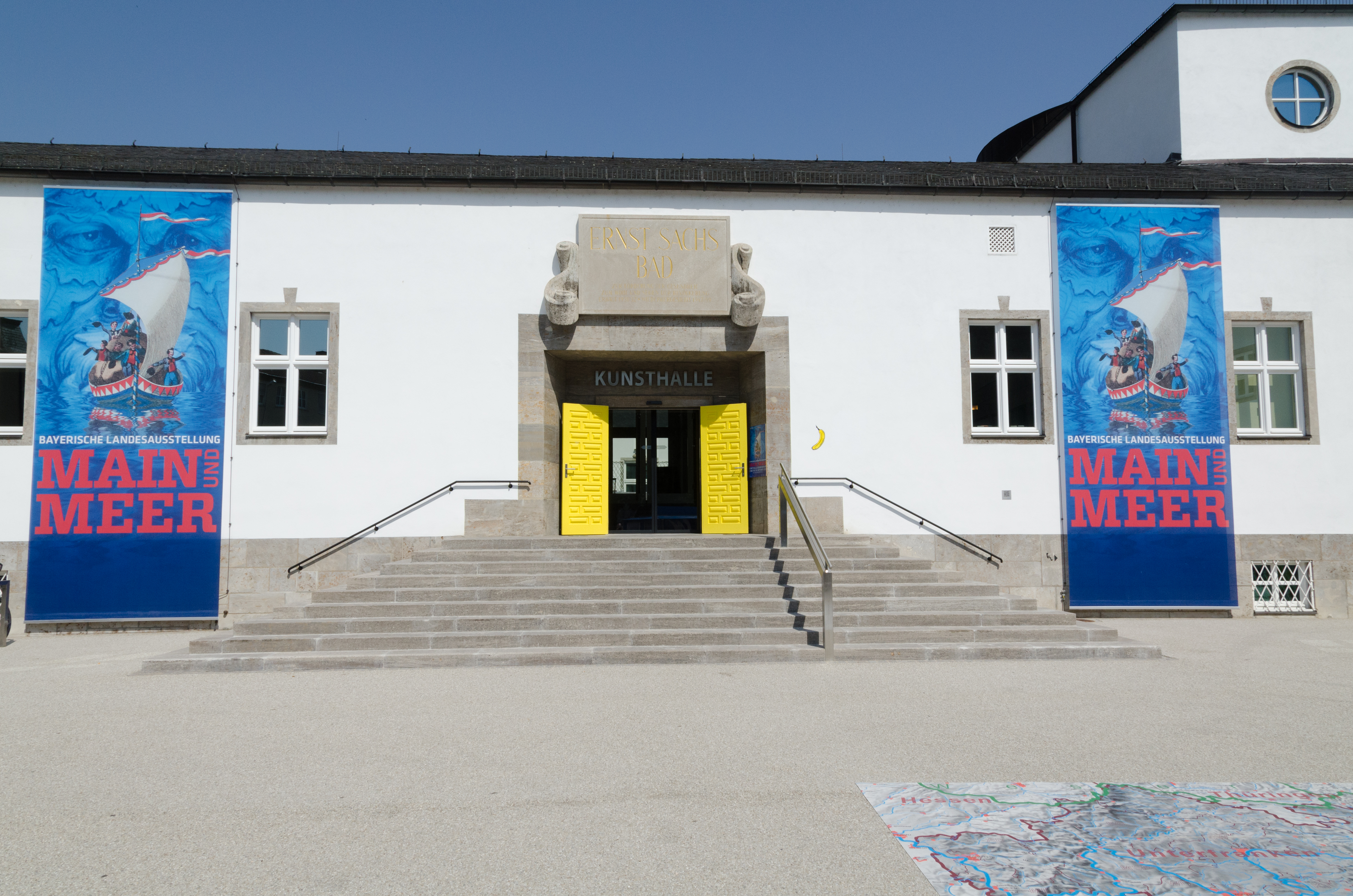 Schweinfurt, Rüfferstraße 4